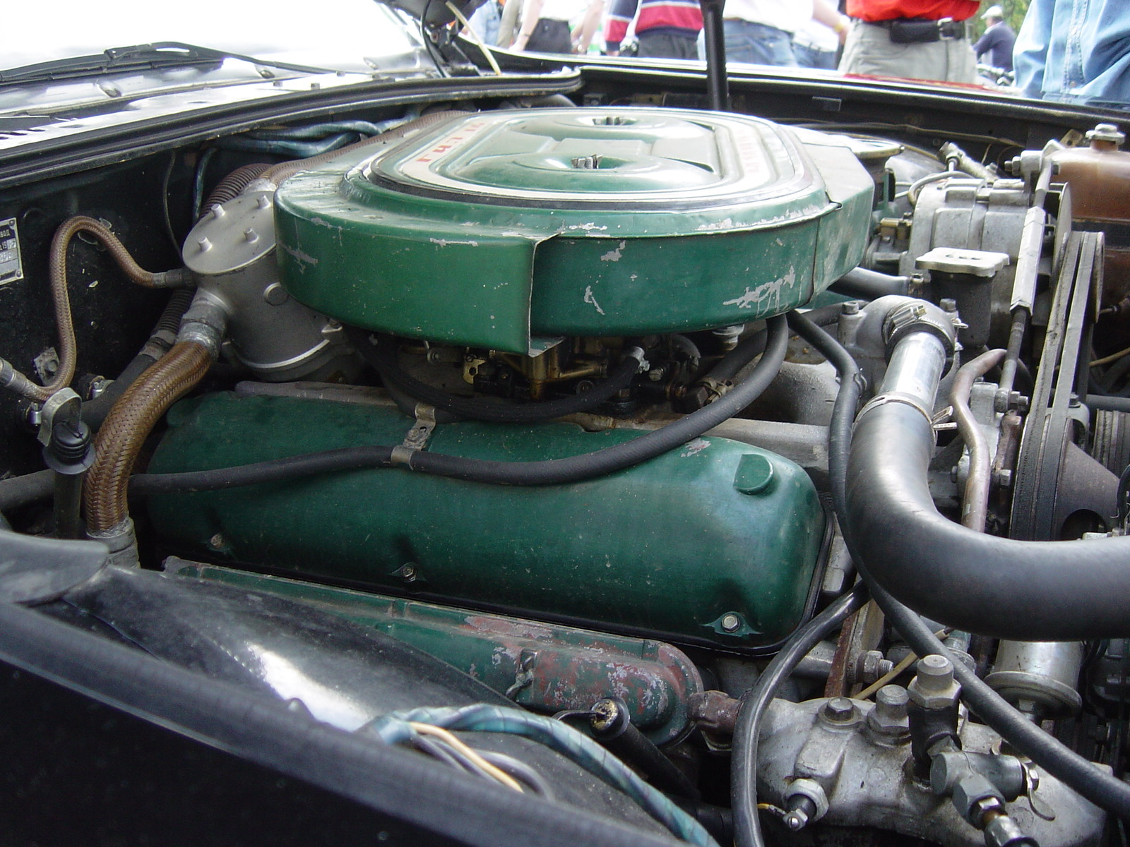 GAZ-14 Chaika engine at the Szocialista Jáműipar Gyöngyszemei 2008.